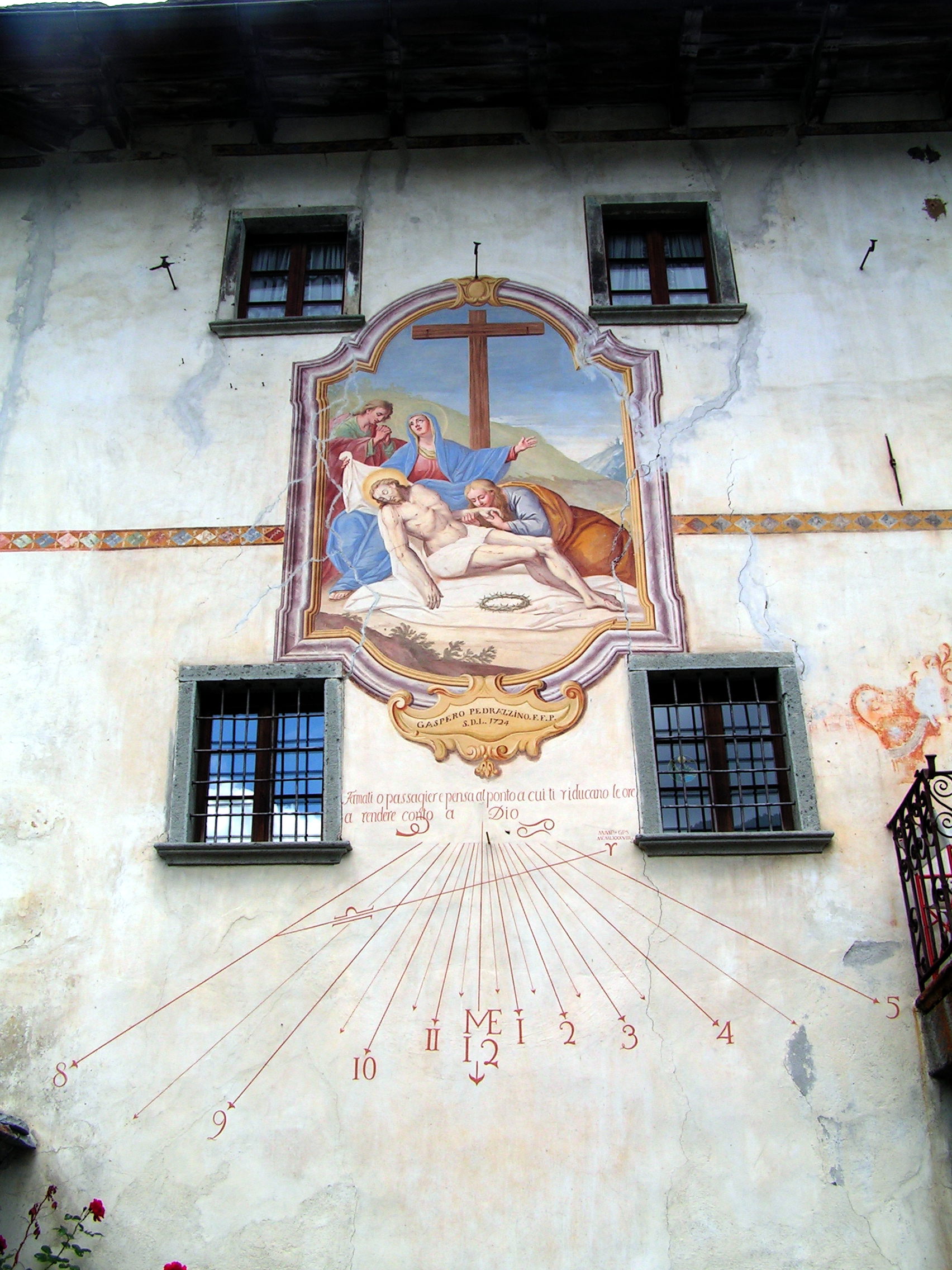 Campo Vallemaggia. Façade de la maison Pedrazzini «ad Fontem» .